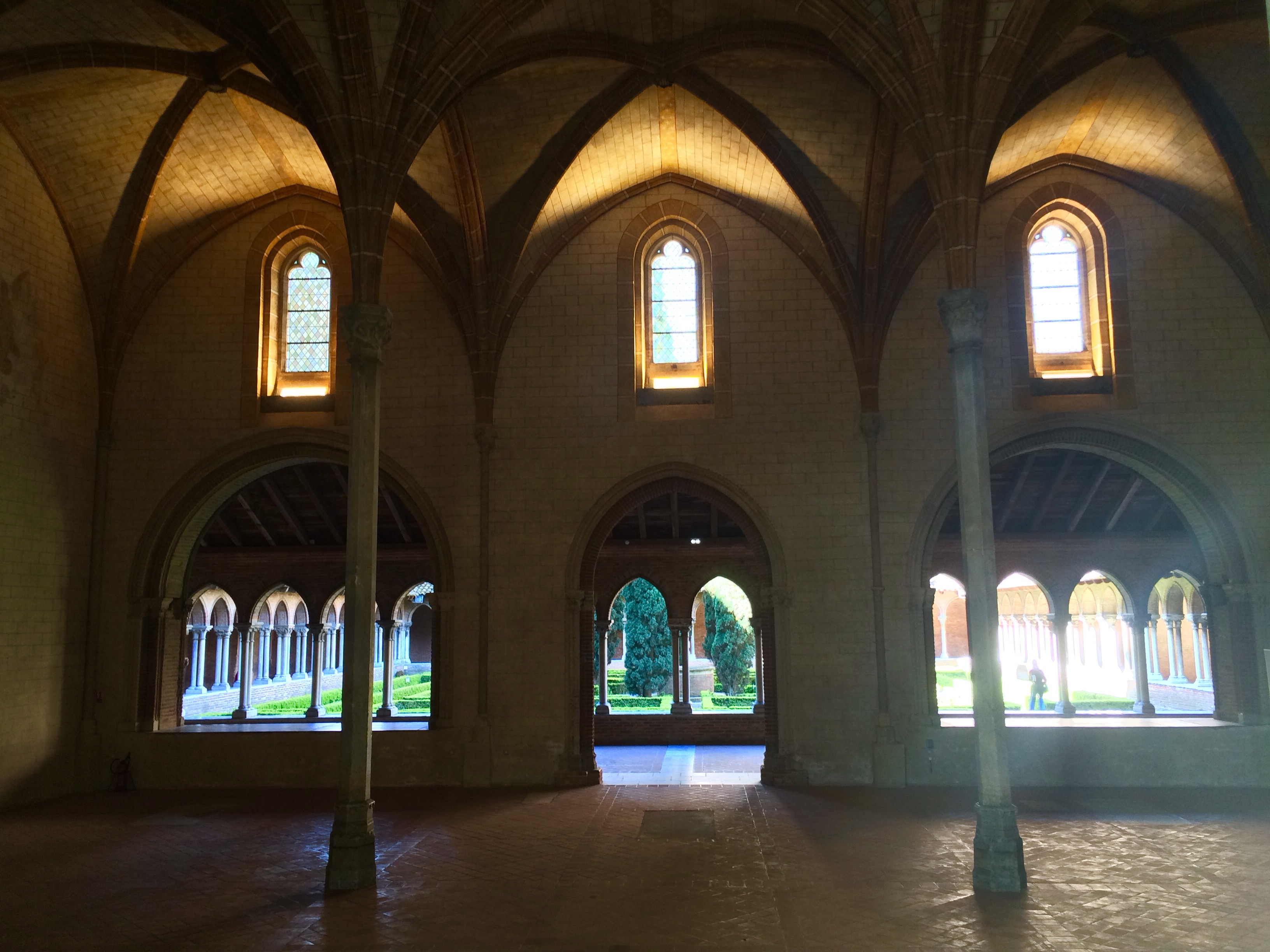 La salle capitulaire avec ses deux fines colonnes prismatiques.